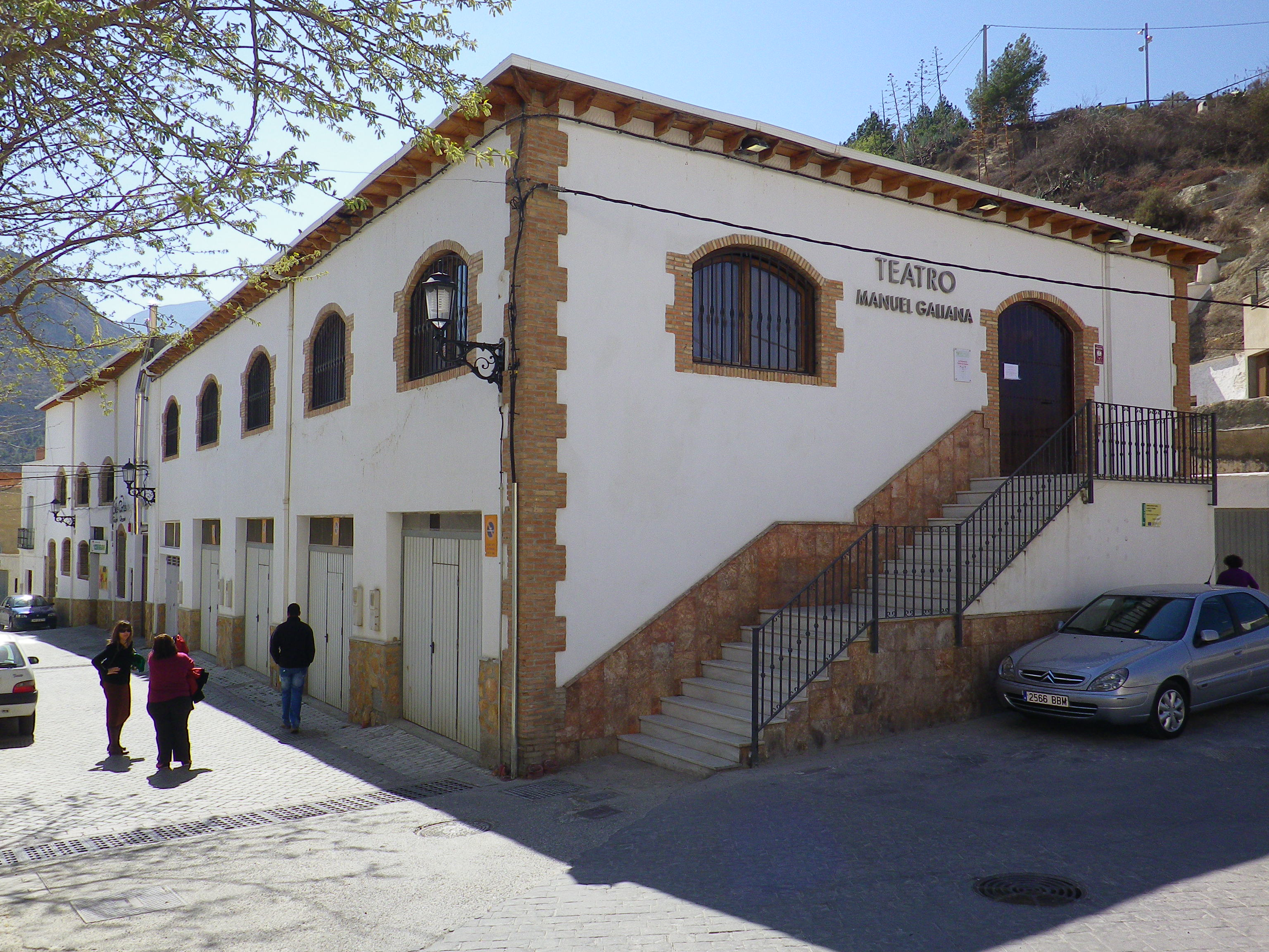 Fotografía de la fachada del Teatro Manuel Galiana de Terque, provincia de Almería, Andalucía, España. Dedicado al actor español (nacido en Madrid) Manuel Galiana cuya madre era de Terque. Sede del Museo Provincial de la Uva del Barco.